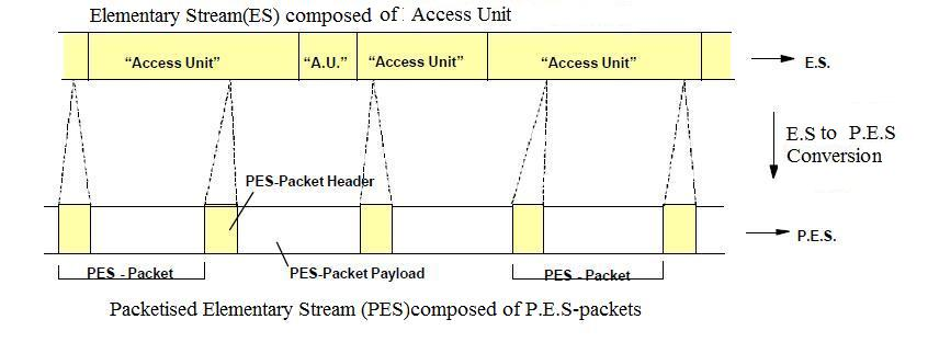 Conversion_de_es_a_pes ingles